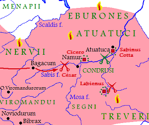 Révolte d'Ambiorix contre les Romains (Détail de la carte de la Gaule en 54 av. J.-C.)